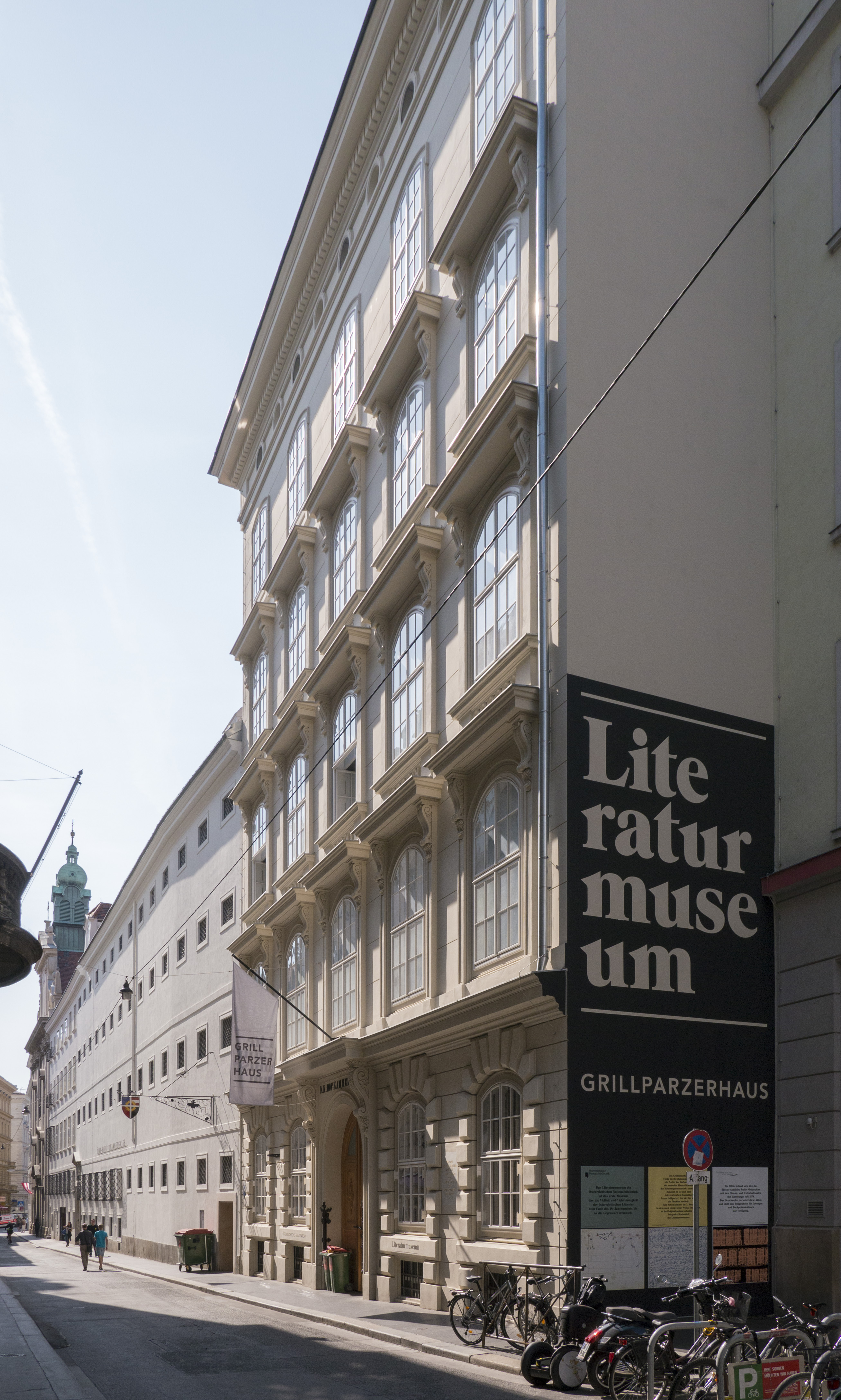 Amtsgebäude, Hofkammerarchiv